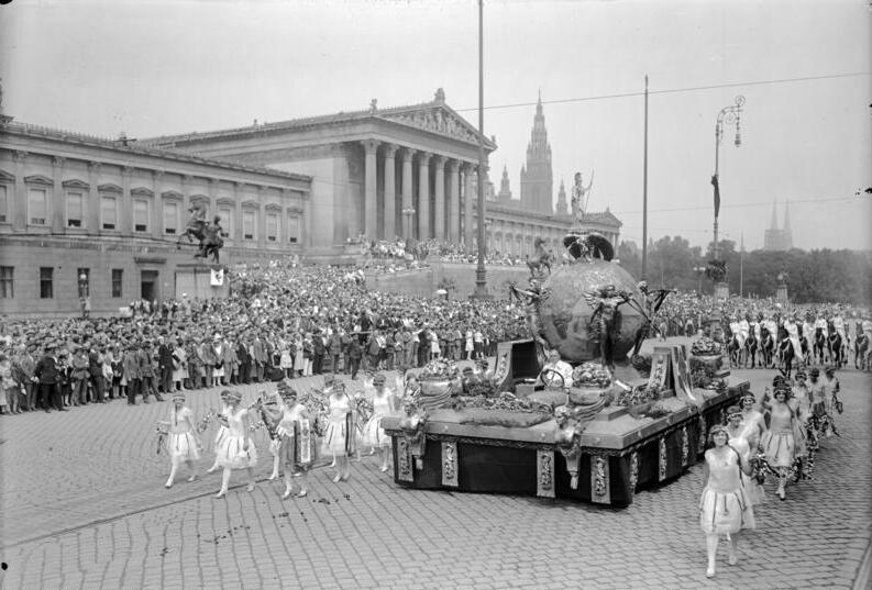 "Der Riesenfestzug des 10. deutschen Sängerbund-Festes in Wien. 200.000 deutsche Sänger zogen durch die Strassen Wiens. Aufnahmen unseres nach Wien entsandten Sonder-Bild-Berichterstatters! ""Das deutsche Lied"", Festwagen mit Ehren-Jungfrauen im Festzuge. Im Hintergrund das Wiener Parlament."